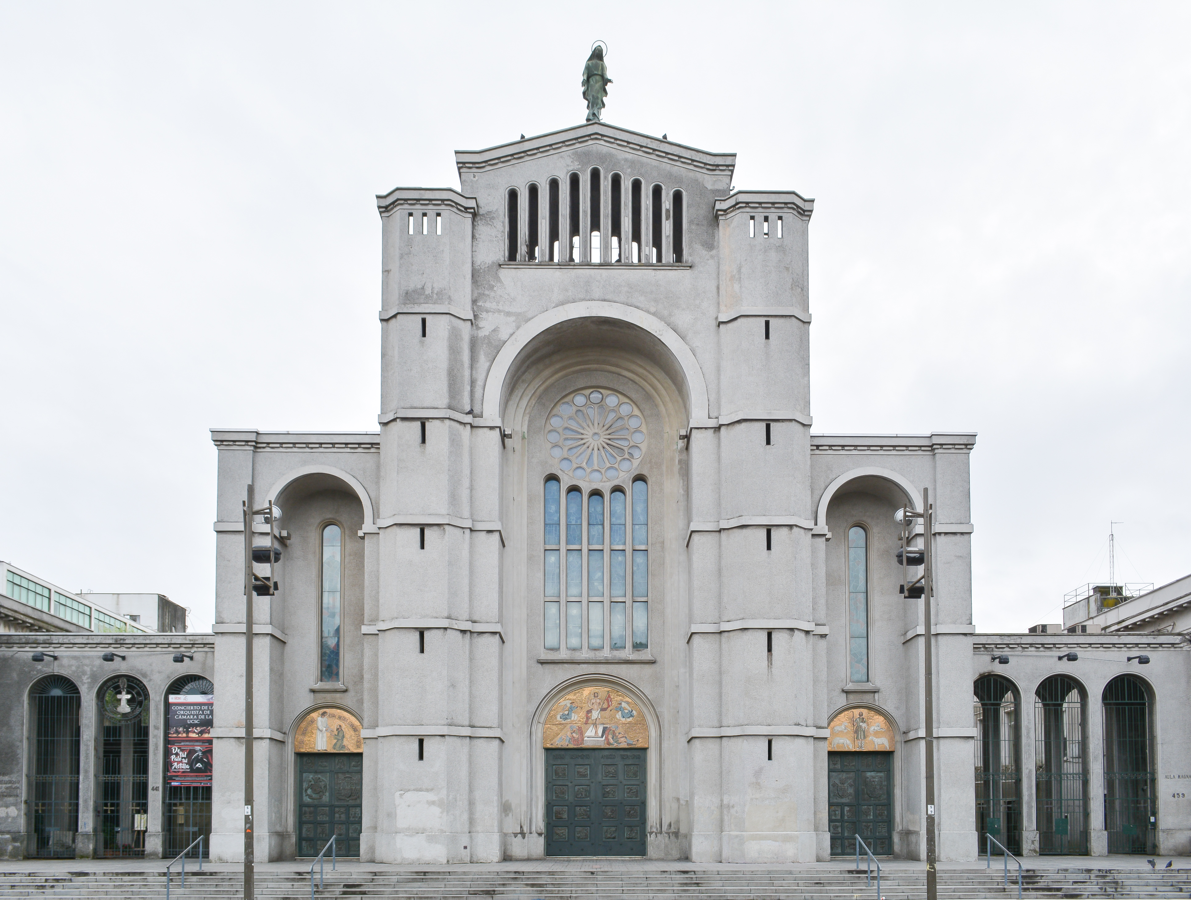 Catedral de la Santísima Concepción, Concepción, Chile